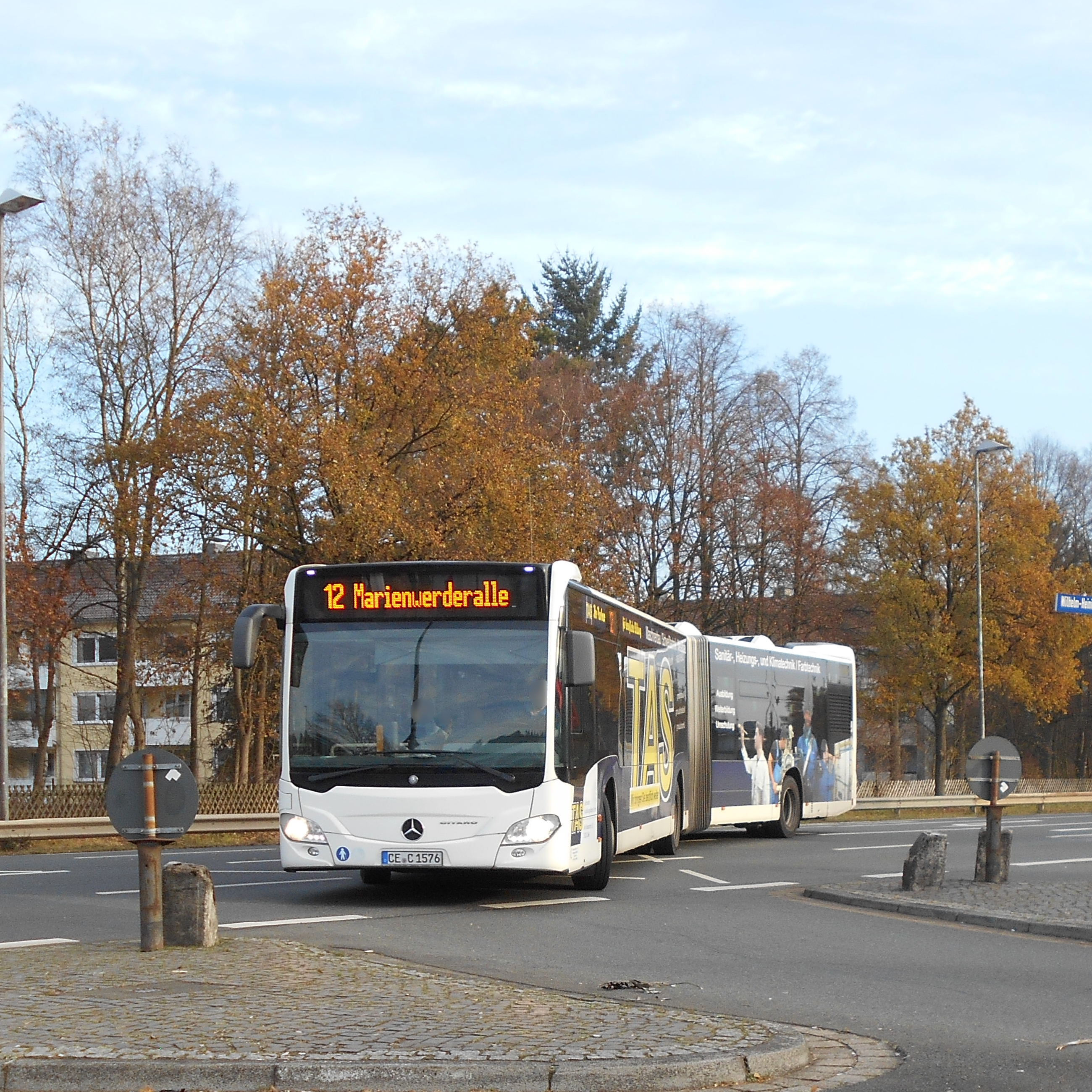 Ein C2G der CeBus. Bus 1676 auf der Linie 12 am 28.11.2018.